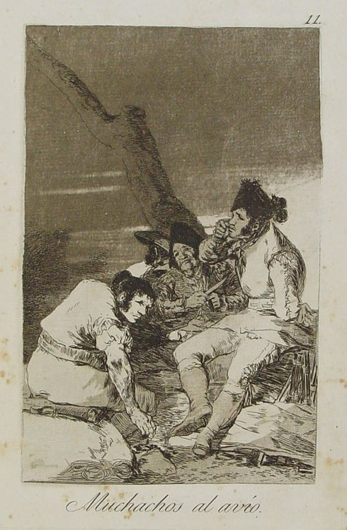 Capricho nº 11: Muchachos al avío de Goya, serie Los Caprichos